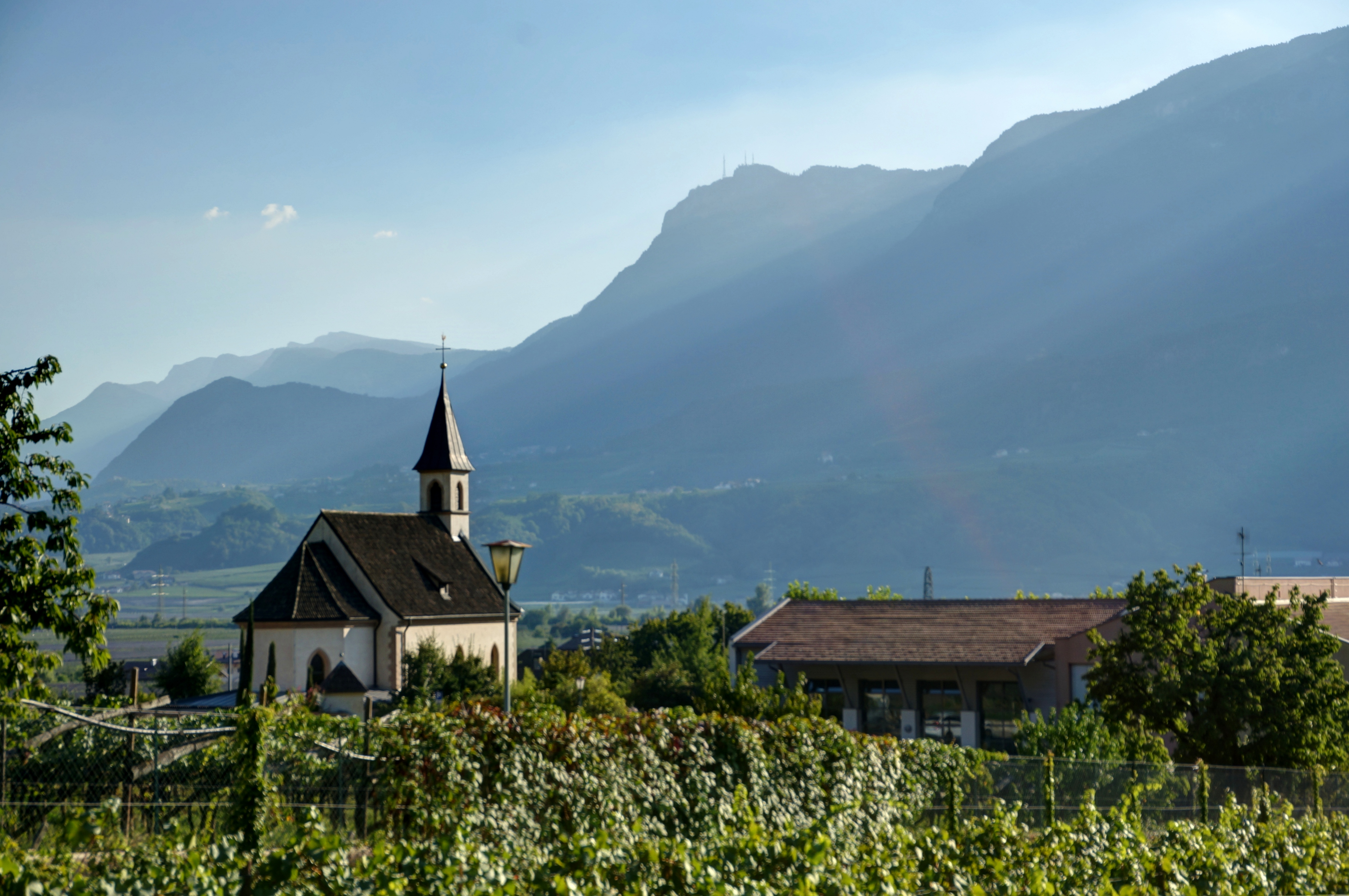 Italien, Südtirol, Terlan, Ortsteil Siebeneich, Pfarrkirche zu "Hlgst. Herzen Jesu", zugehörig der Diözese Brixen-Boxen, anvertraut dem Deutschen Orden, gesehen vom Pater Romedius Weg'